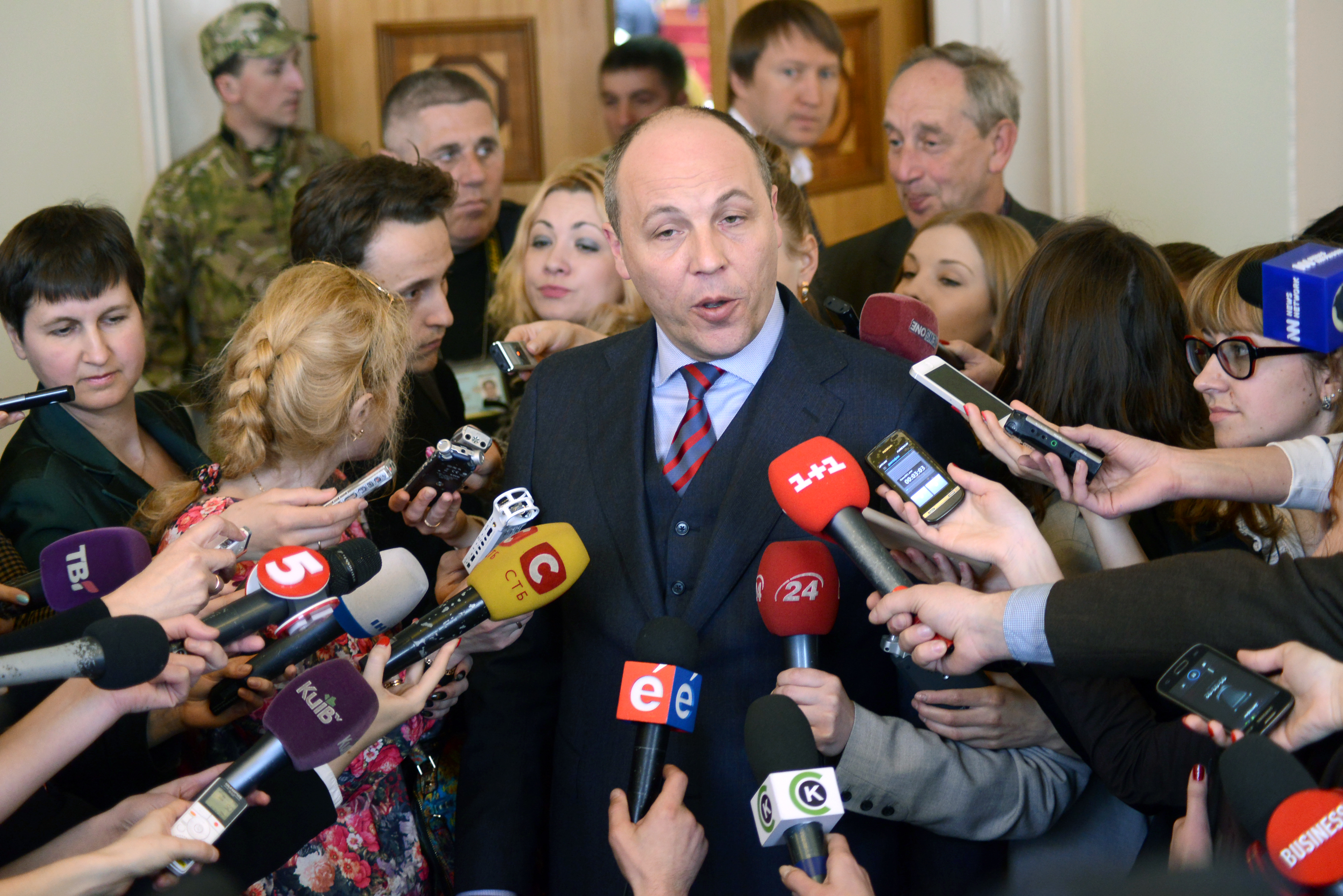 ВЕРХОВНАЯ РАДА УКРАИНЫ , фото Вадим Чуприны 24 . 04 . 2016 .